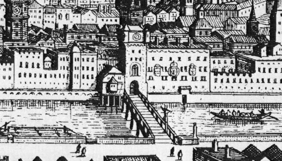 Innbrücke in Innsbruck, Ausschnitt aus: Oenipons. Inspruckh (von Westen her), 1649, in: Topographia Provinciarum Austriacarum …